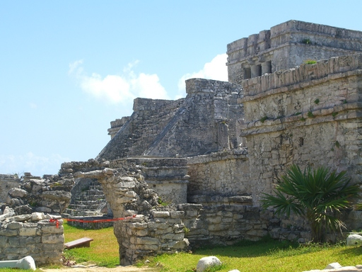 "Castle" at Tulum, Q. Roo